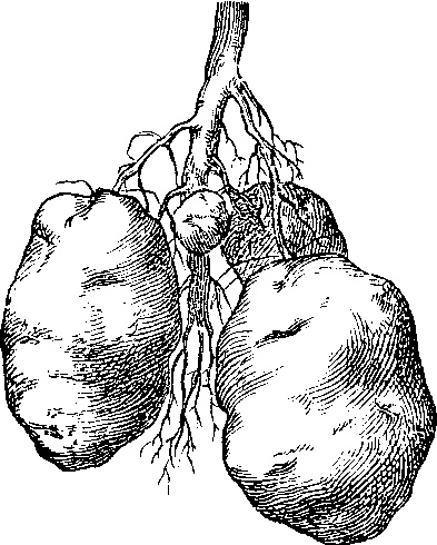 Slika 4: Gomolj, viseč na živicah.